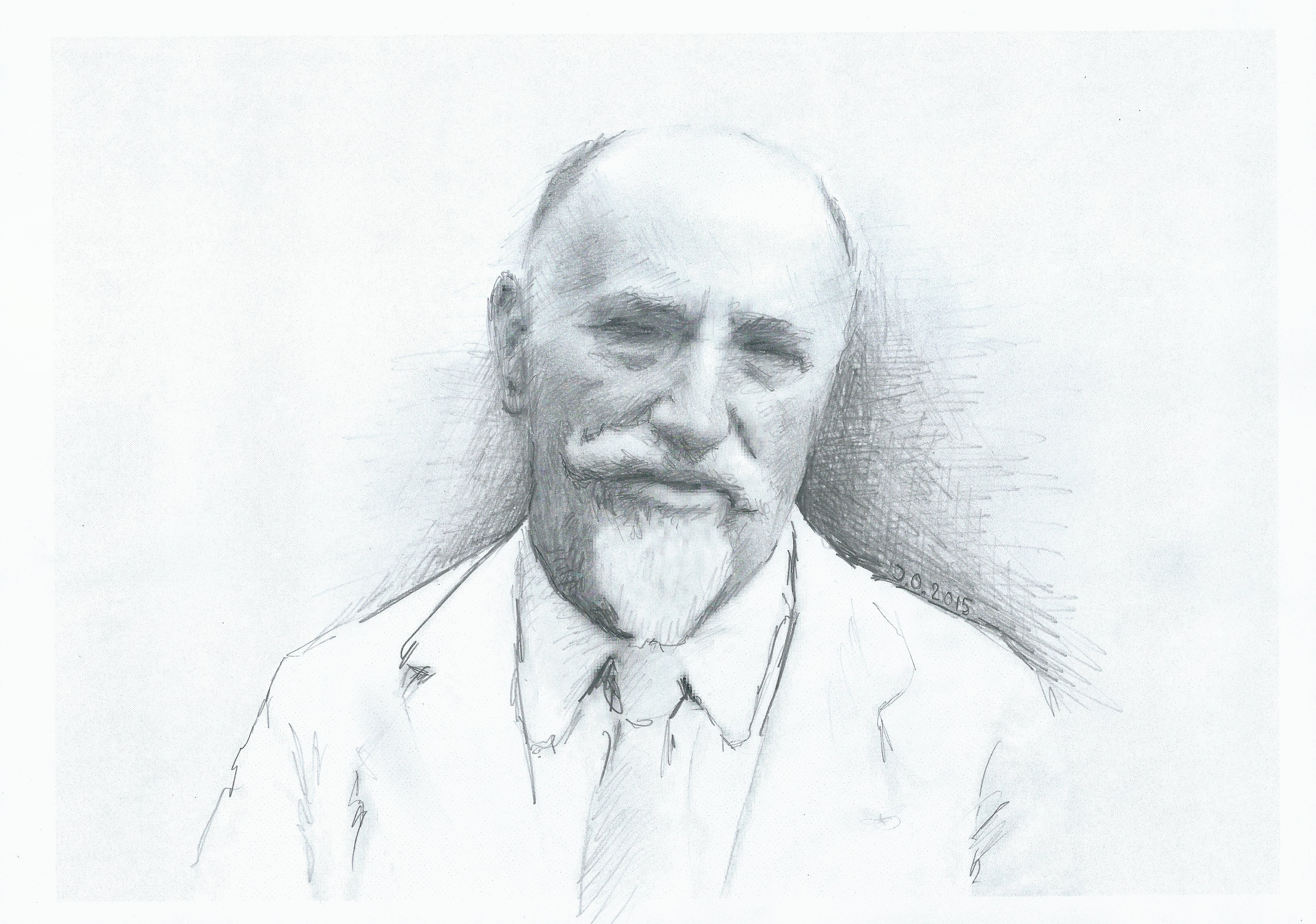 Wizerunek Feliksa Konecznego (ur. 1862 , zm. 1949), polskiego historyka.